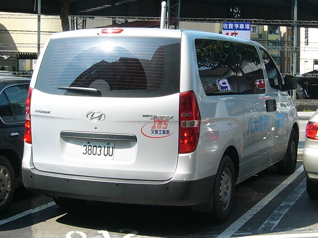 八大電視現代Starex公務車3803-UU，向艾維士租車租用。